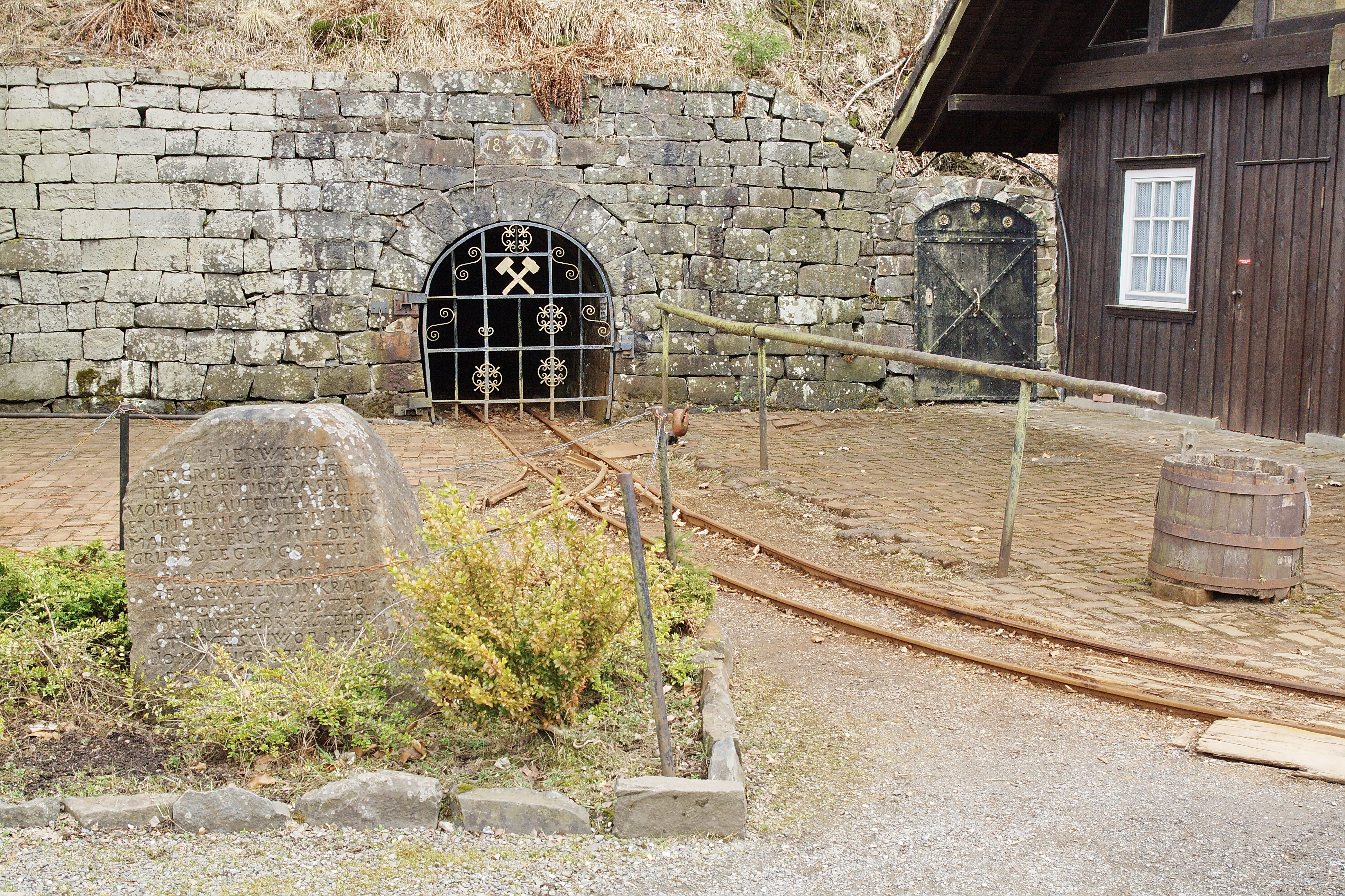 Bergbaumuseum auf "Lautenthals Glück" in Lautenthal im Harz (Niedersachsen)